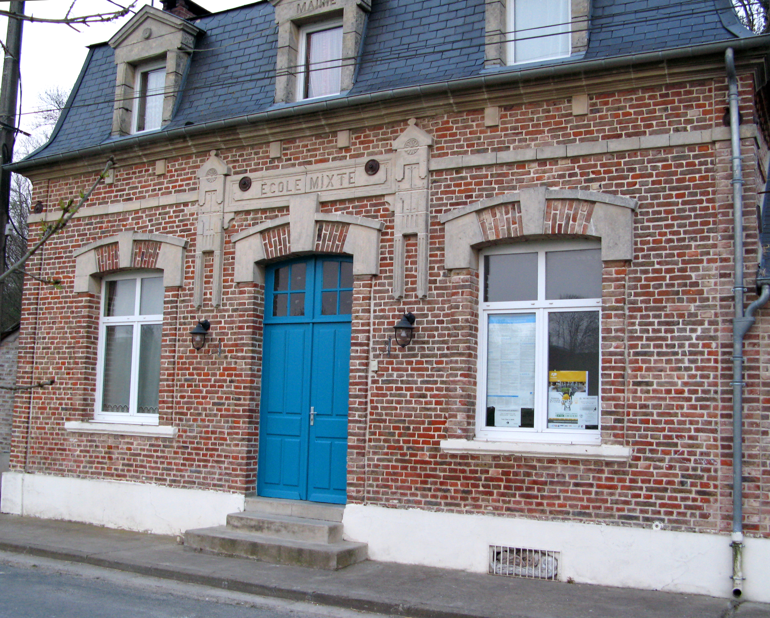 Molliens-Dreuil (Somme, France)